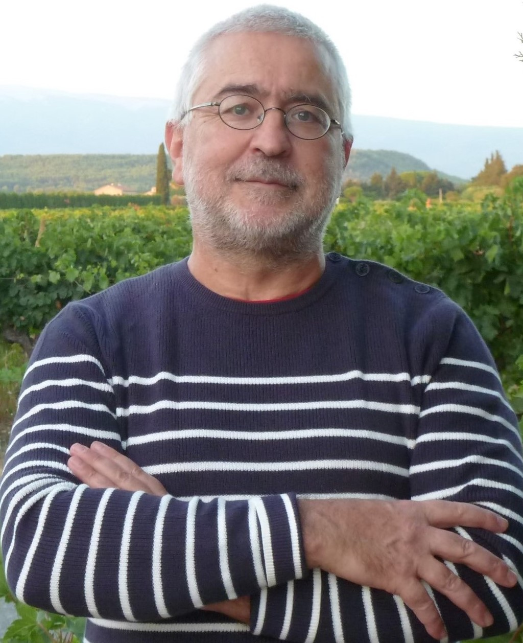 TP2017